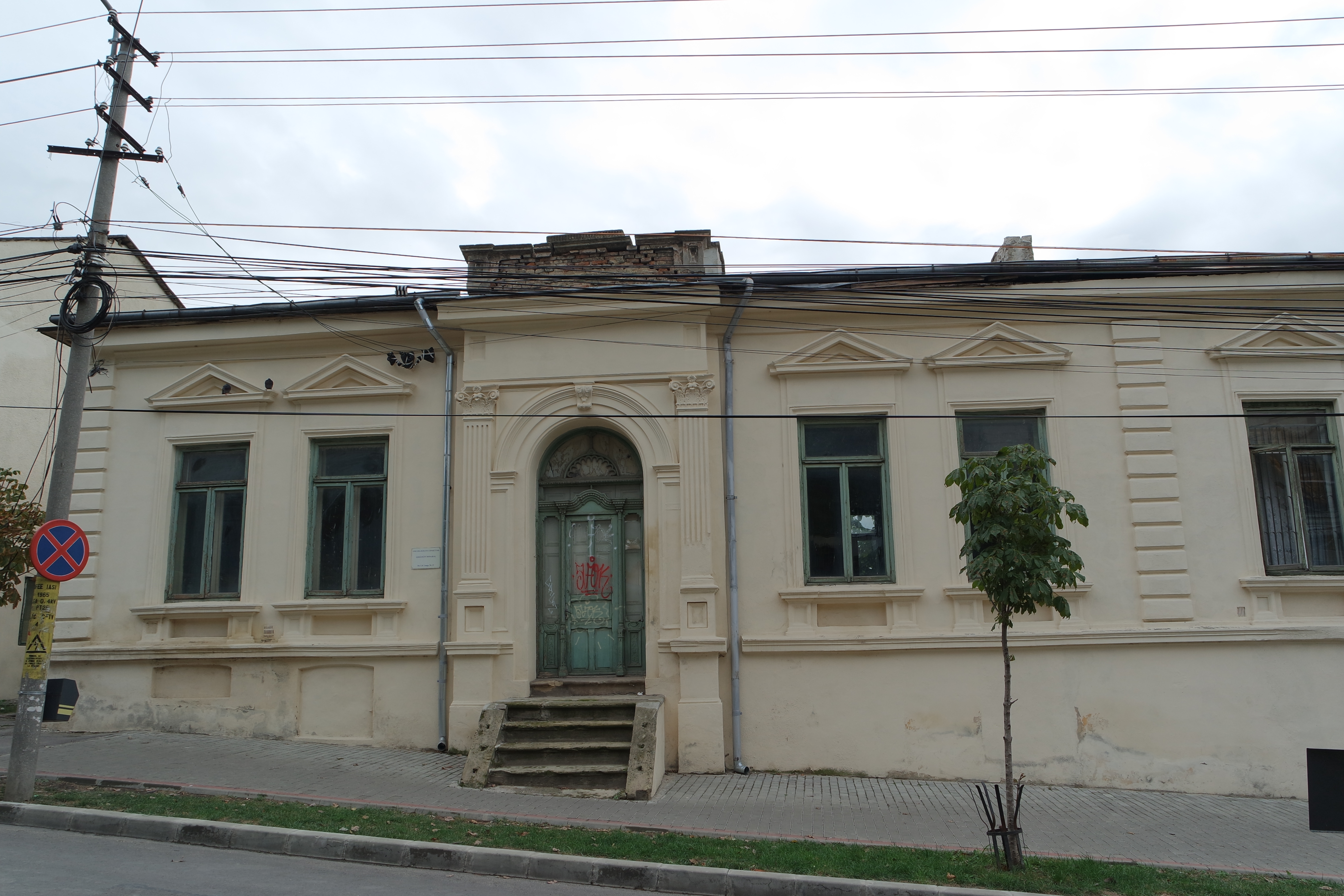 Episcopia Romano Catolica Iasi - Asezamant Monahal Str.Colonel Nicolae Langa Nr.13